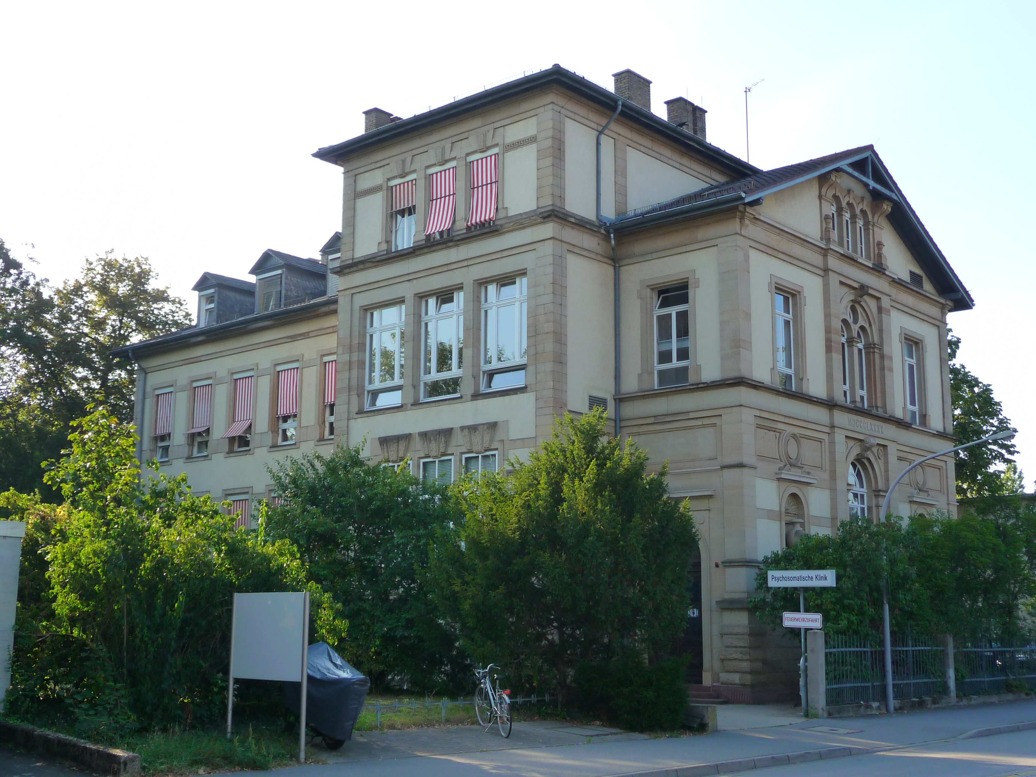 Psychosomatische Klinik des Universitätsklinikums Heidelberg im Stadtteil Bergheim; erbaut 1889, aufgestockt 1910/11, ursprüngliche Nutzung als Hygienisches Institut